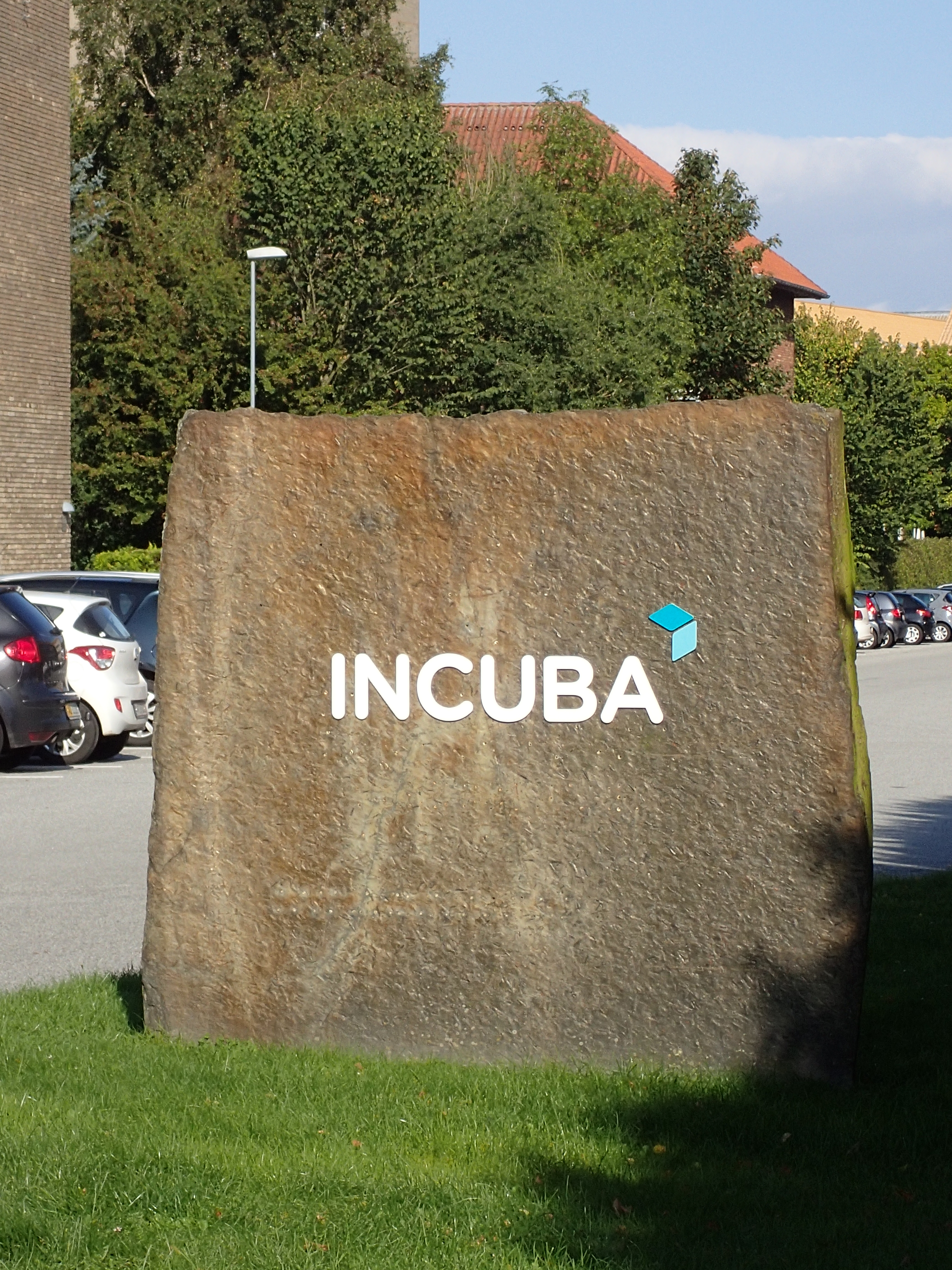 INCUBA logo-sten ved Forskerparken på Gustav Wieds Vej.